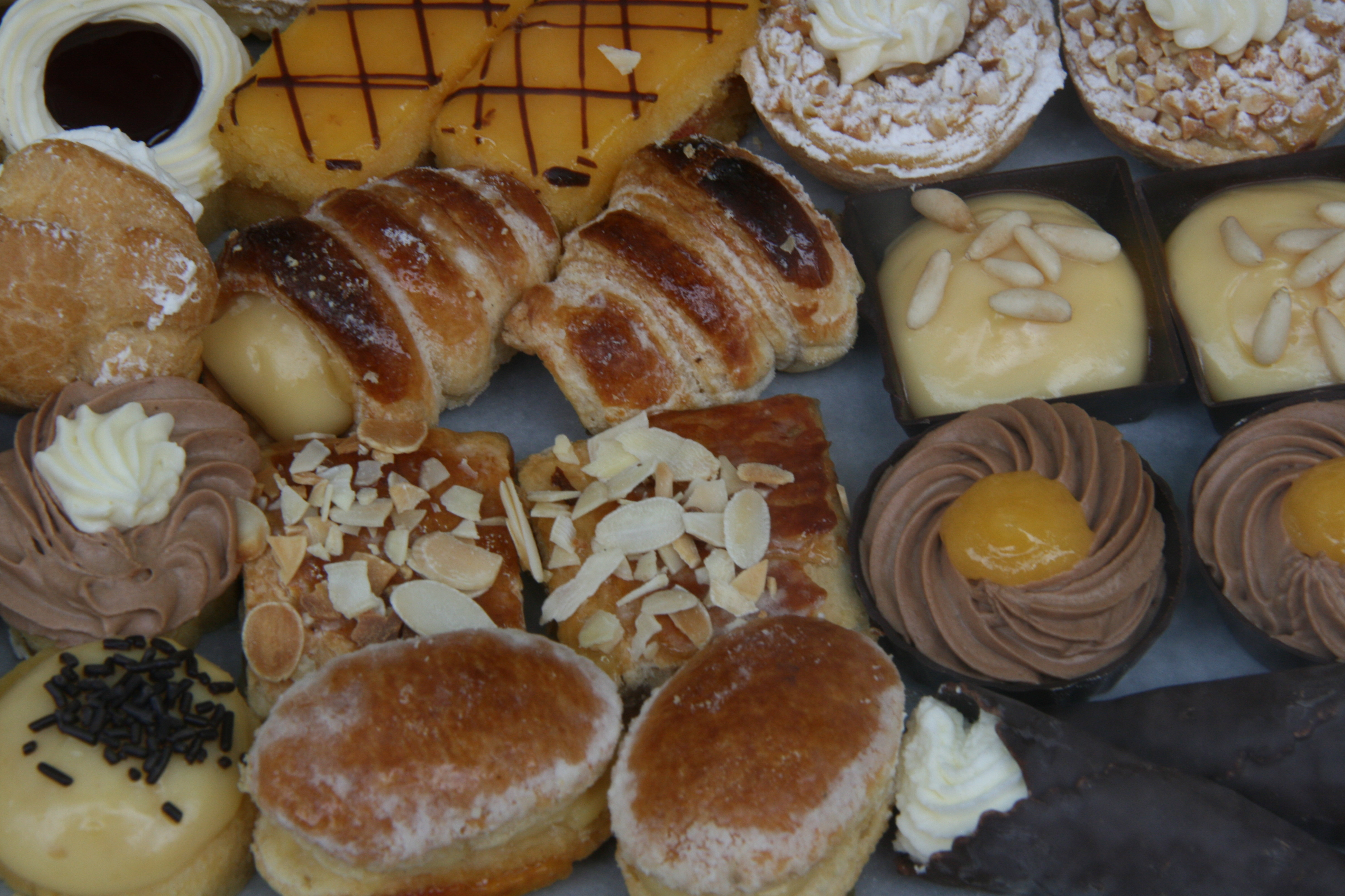 Surtido de pasteles